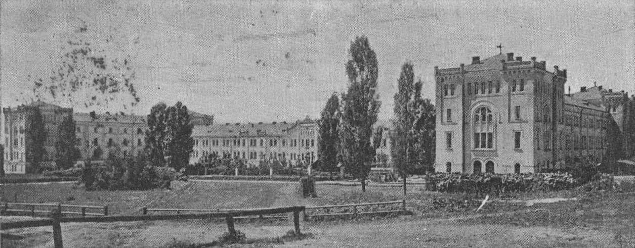 Zakład Sierot i Ubogich w Drohowyżu na pocztowce.